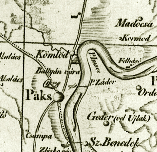 Ausschnitt aus der Mappa generalis regni Hungariae; gestochen von Ján Lipský; gedruckt 1809 zu Wien im Verlage des Kunst u. Industrie Comptoirs.